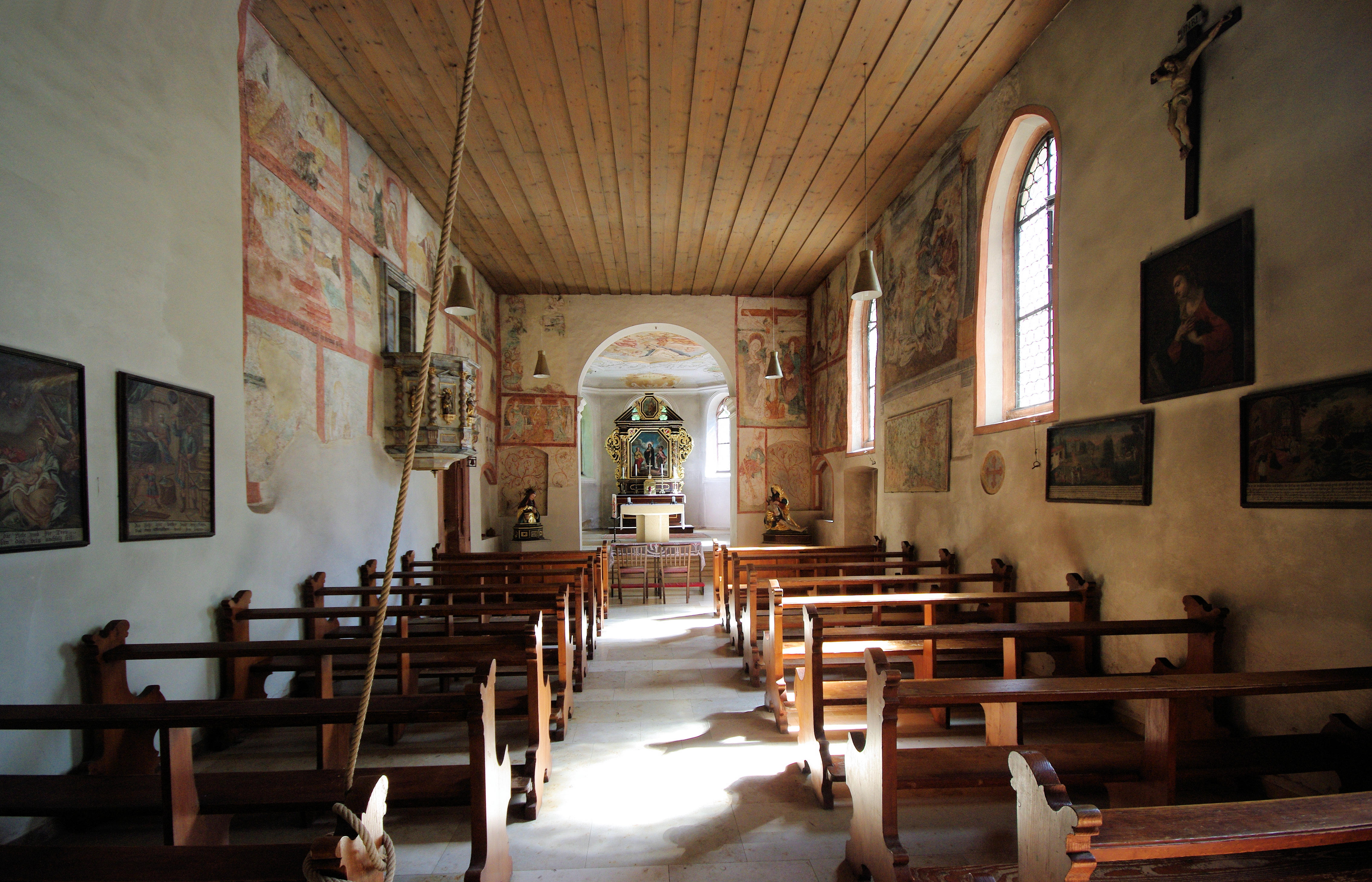 Innenraum der Wallfahrtskirche St. Ottilien